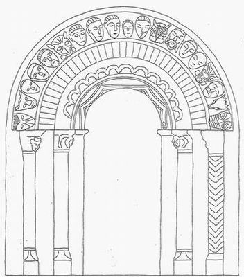 Dysert O'Dea templomromjának déli kapuja, részlet